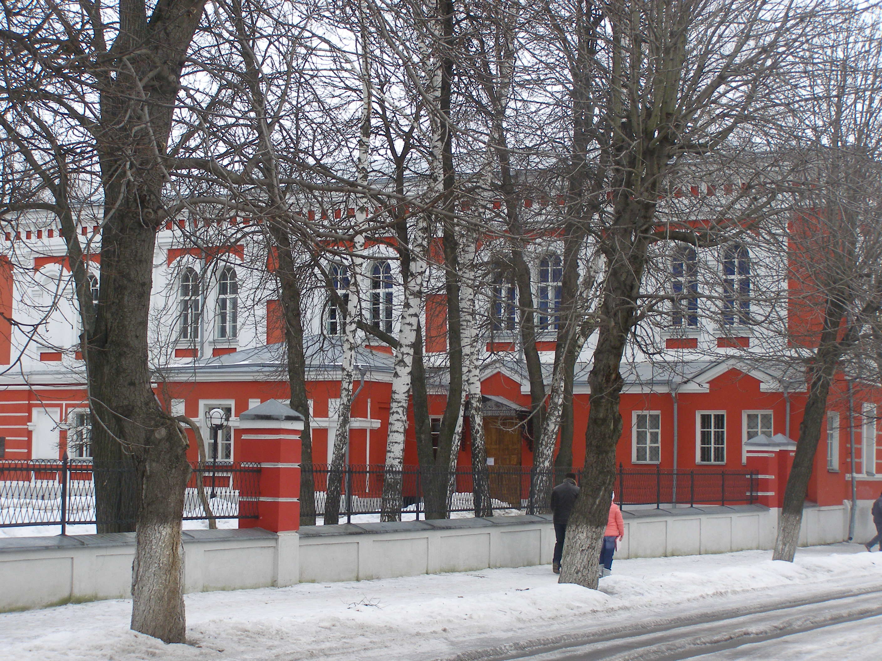 Будинок Глухівського учительського інституту, Глухів, вул. Києво-Московська, 24 / вул. Інститутська, 25